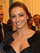 Встреча со спортсменами – победителями чемпионатов мира и Европы 2010 года. Евгения Канаева.